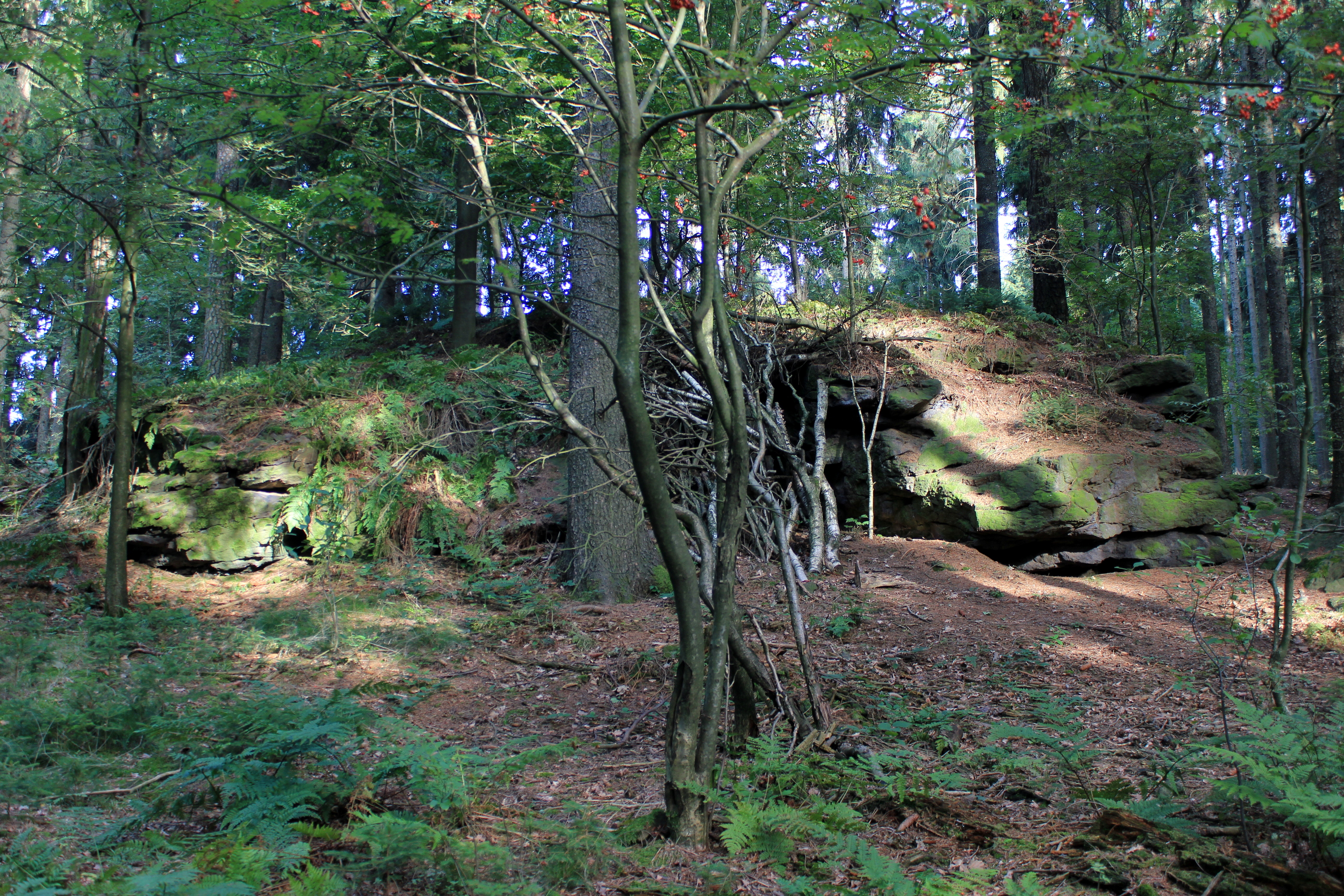 Die sogenannten "Katzensteine" auf dem Butterberg bei Bischofswerda.